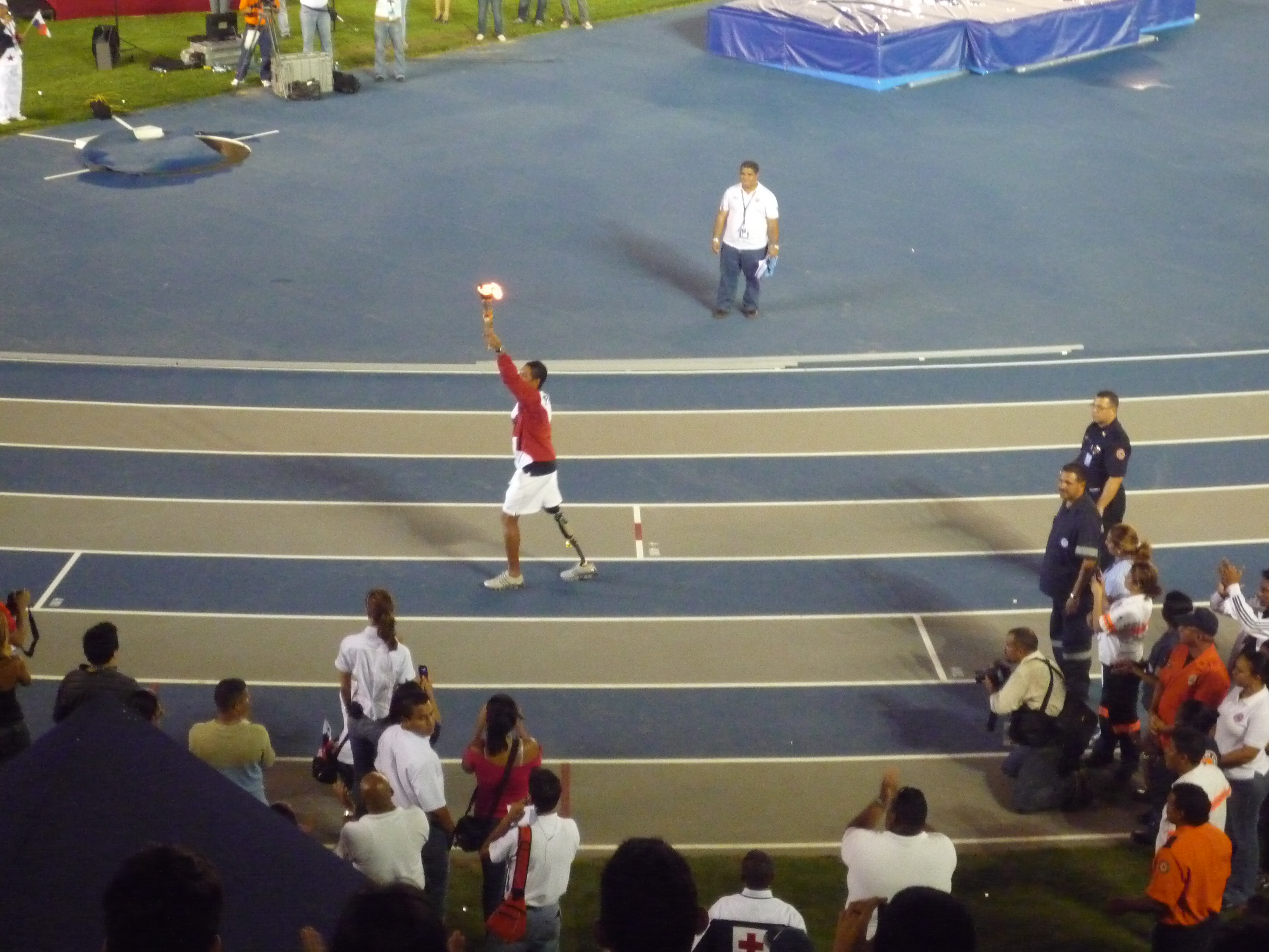 César Barría, nadador panameño portando en pebetero con la llama olimpica de los juegos deportivo centroamericanos 2010.